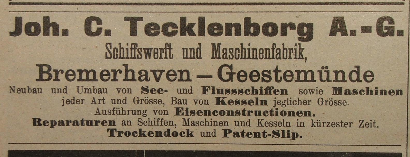 Werbung der Tecklenborg-Werft in der Fachzeitschrift "Hansa" von 1913